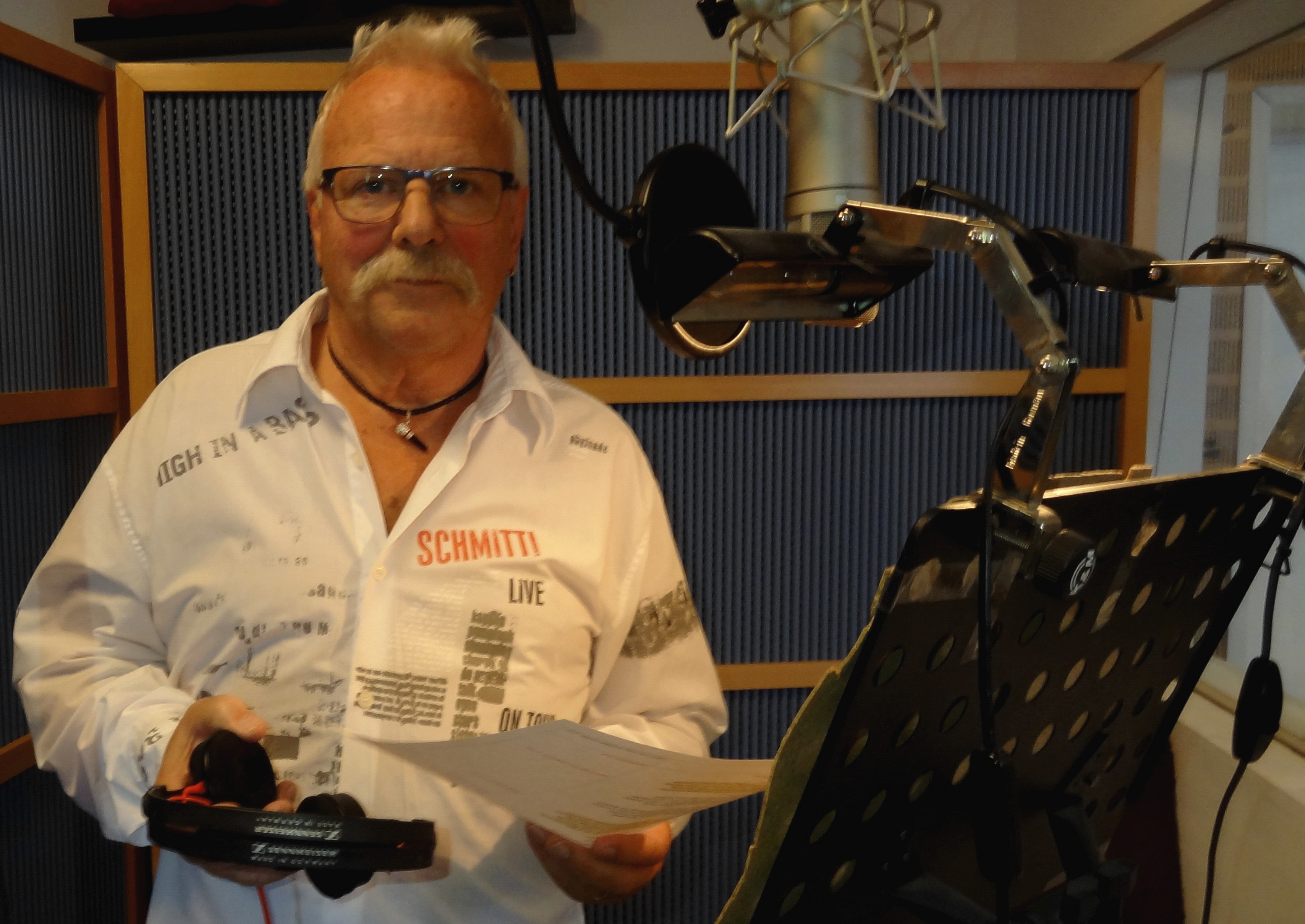 Schlagersänger, Komponist & Texter Schmitti im Tonstudio.